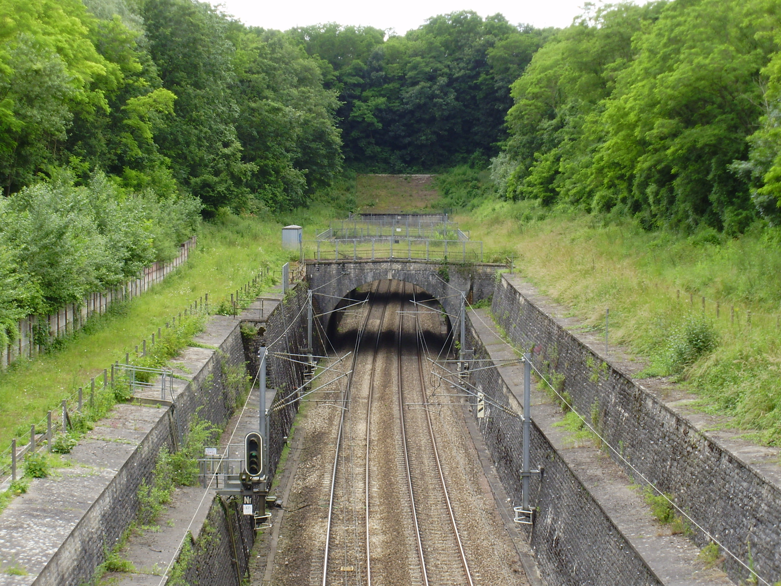 Tunnel de Bréval, tranchée est sur le territoire de Boissy-Mauvoisin, Yvelines, France : l'entrée est du tunnel se trouve après le pont visible au second plan.